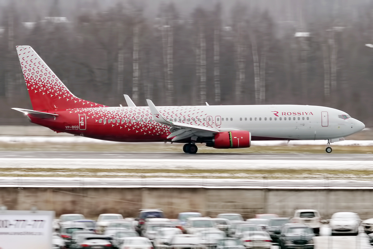 Rossiya, VP-BGQ, Boeing 737-8LJ